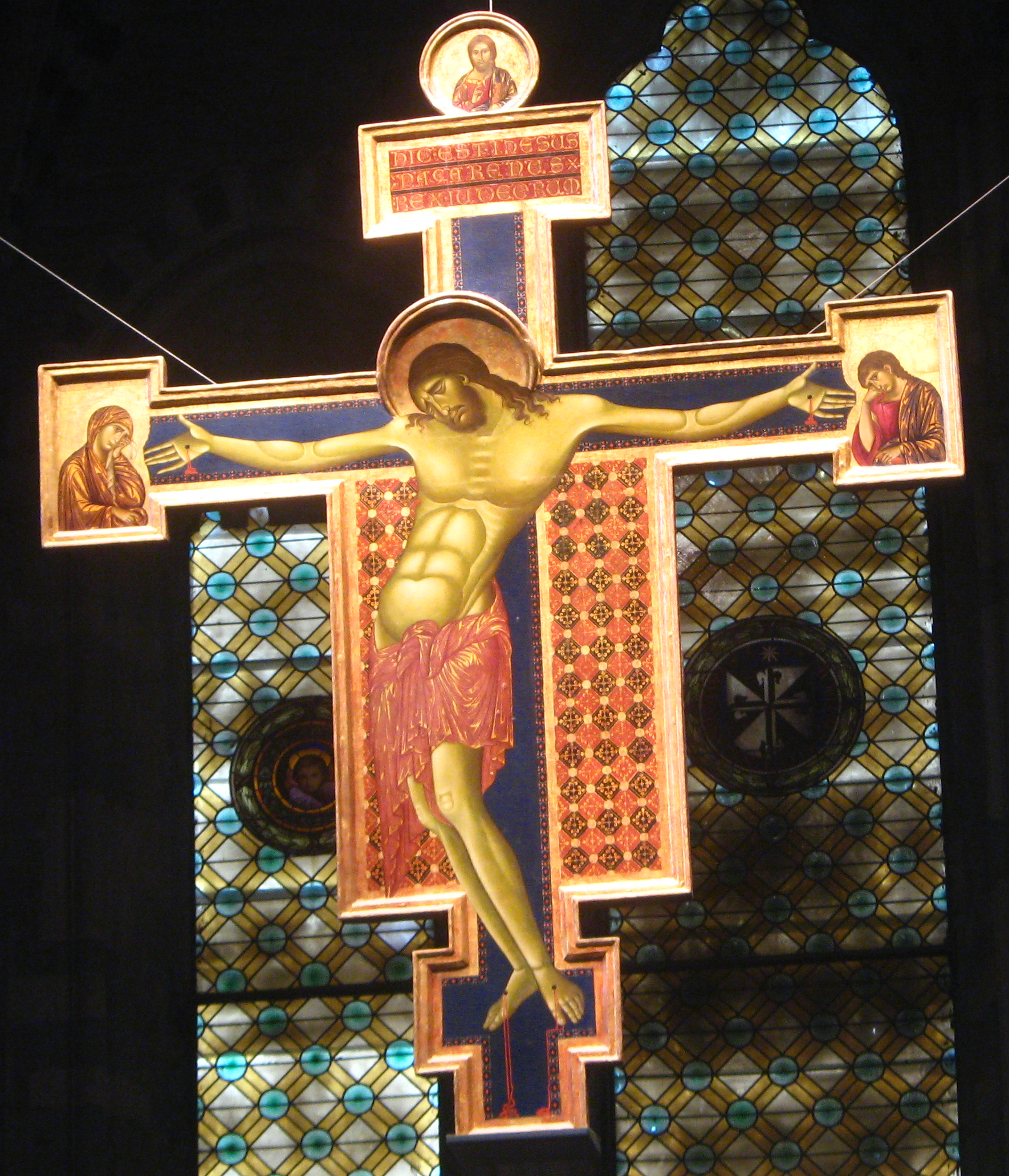 Il crocifisso di Cimabue (1268-1271), restaurato, conservato nella chiesa di San Domenico ad Arezzo.